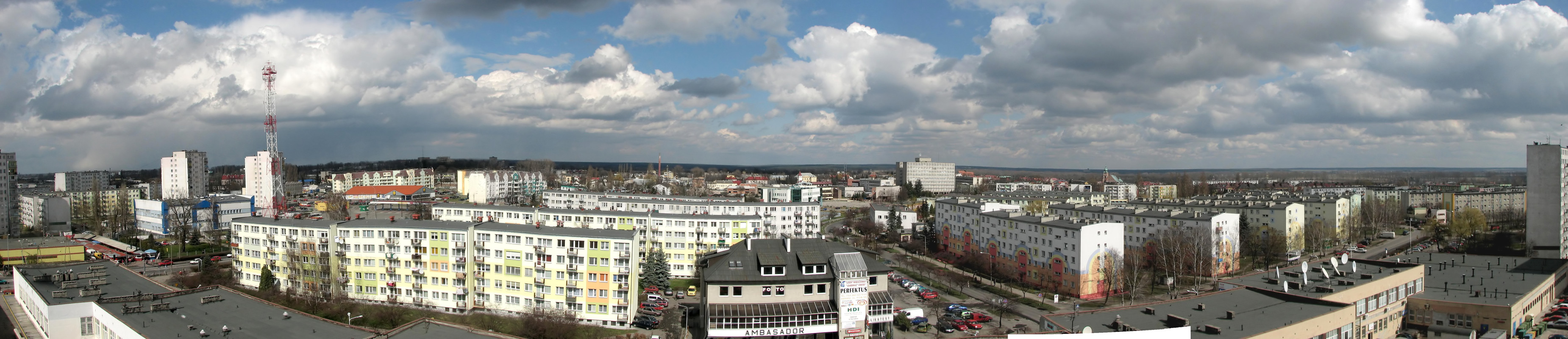 Panorama Sieradza z ul. Alei Pokoju